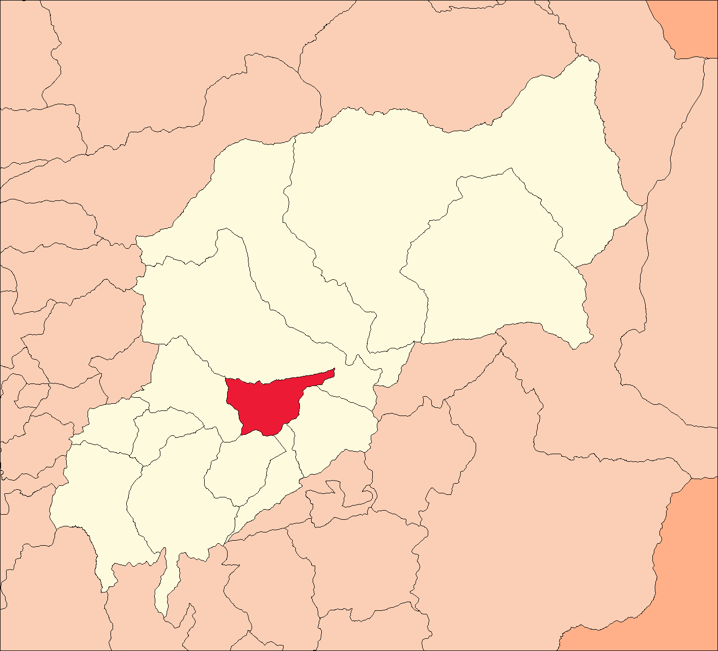 Área del distrito de Huánuco.